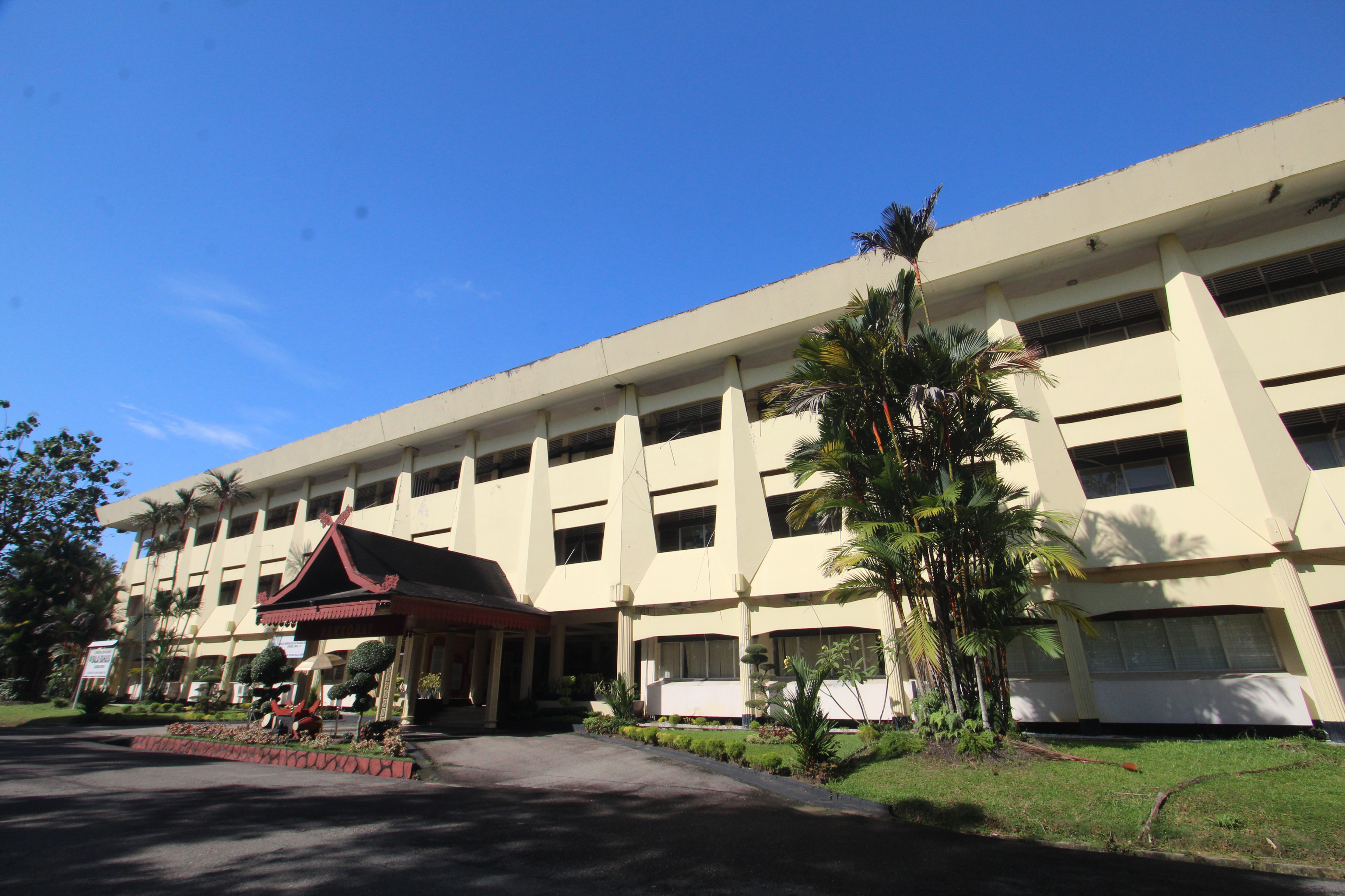 Gedung Universitas Lancak Kuning di Pekanbaru